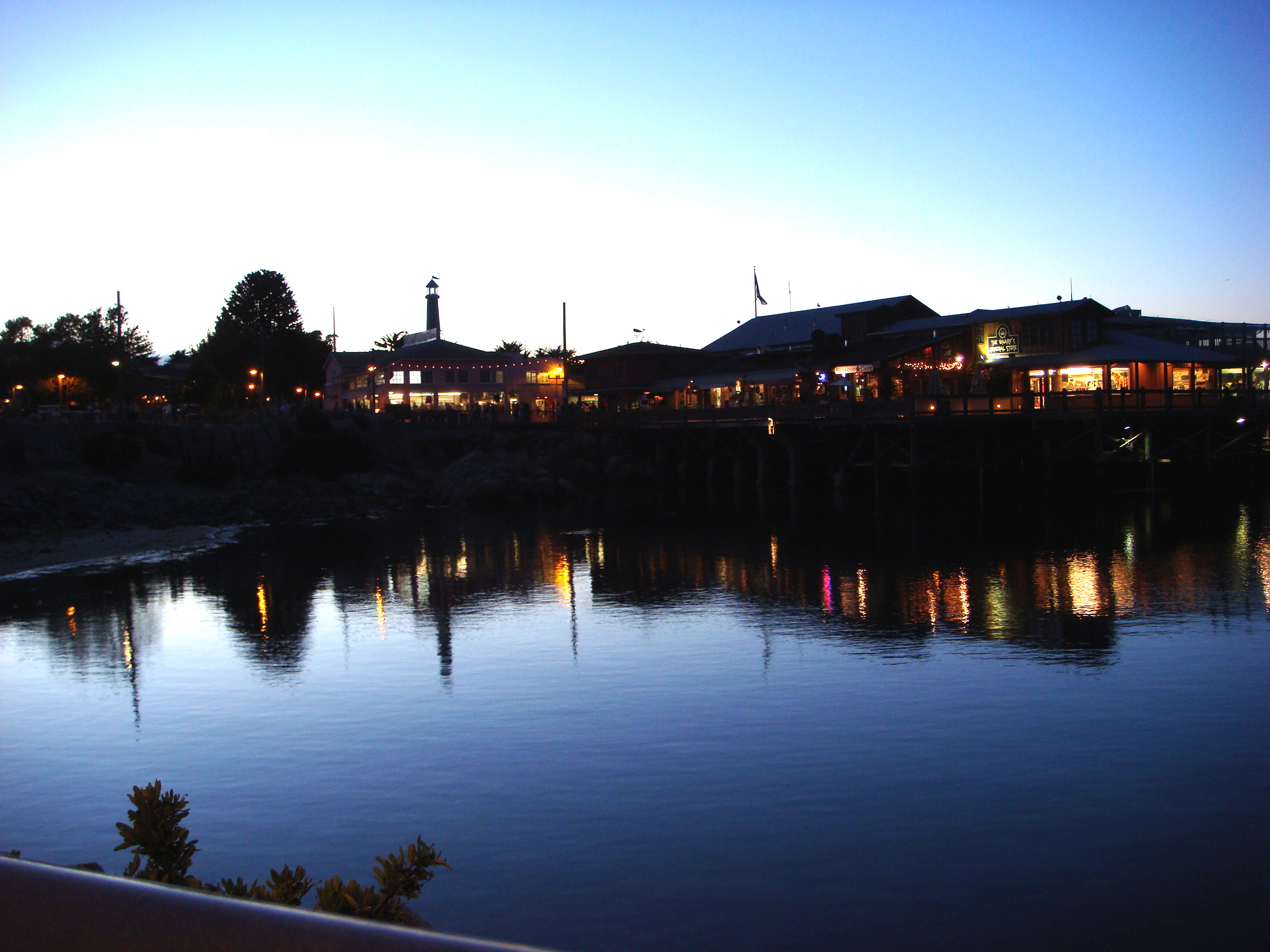 Monterey skyline